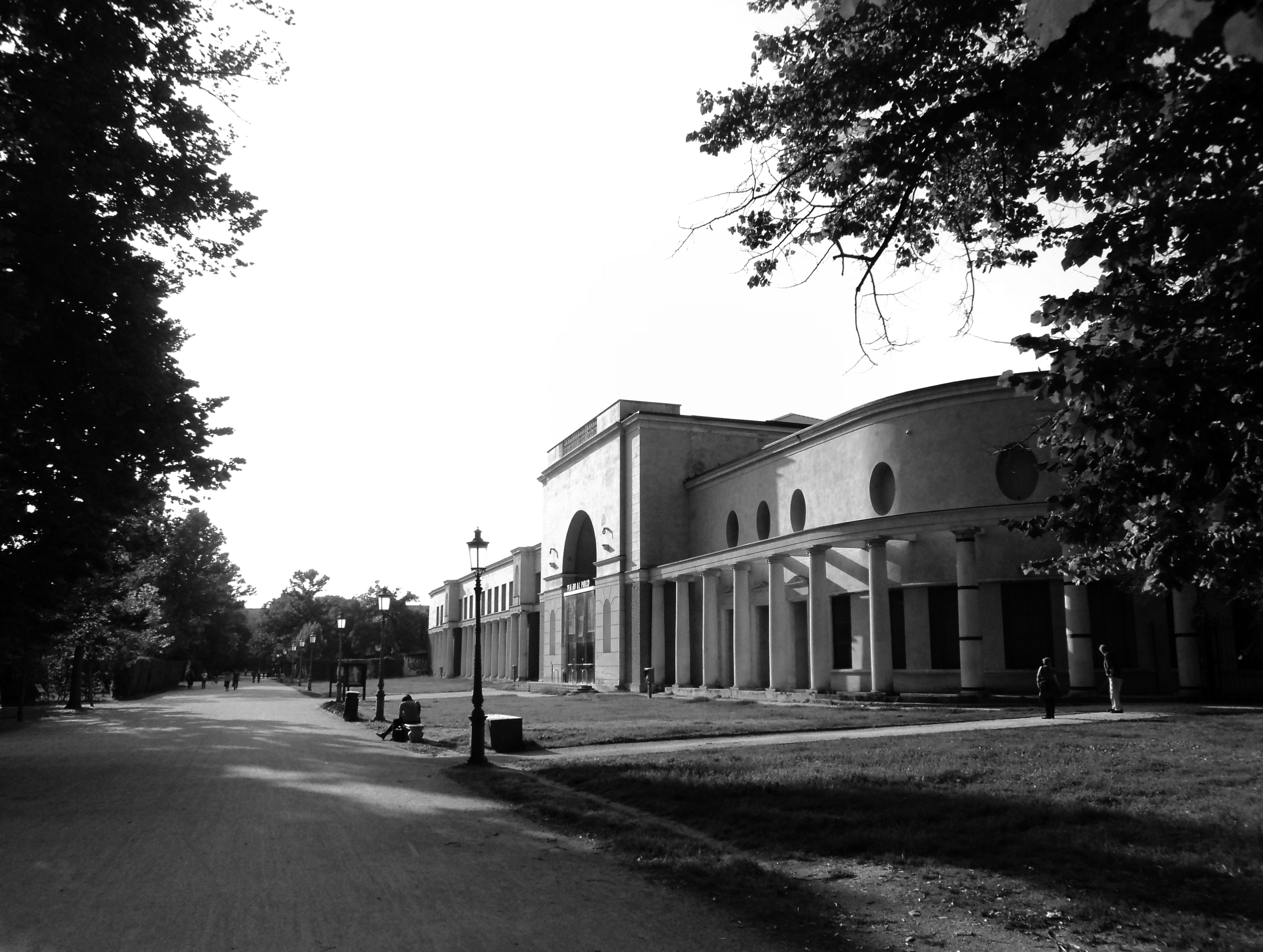 Parco Ducale This is a photo of a monument which is part of cultural heritage of Italy.